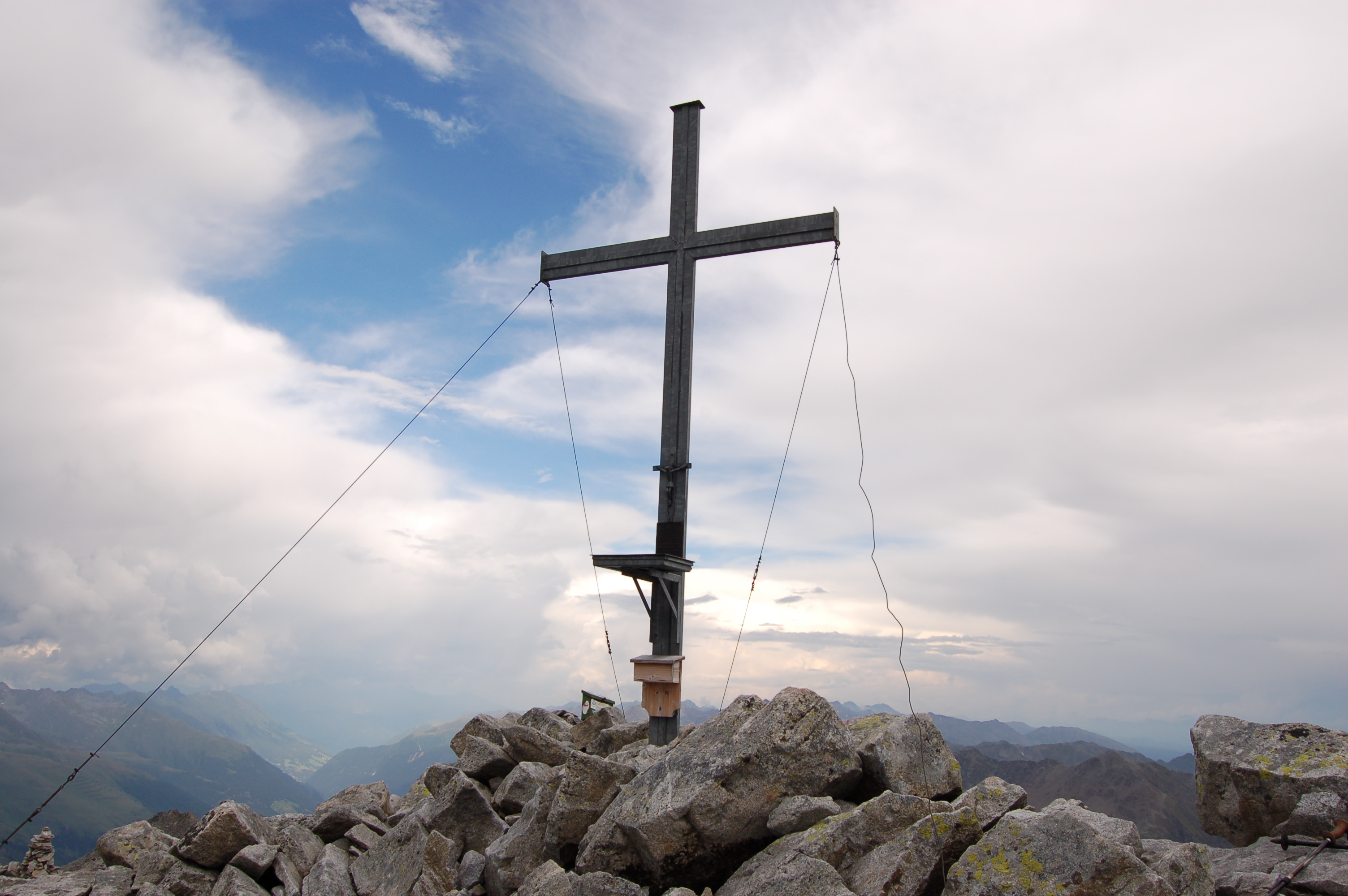 Almerhorn, Gipfelkreuz